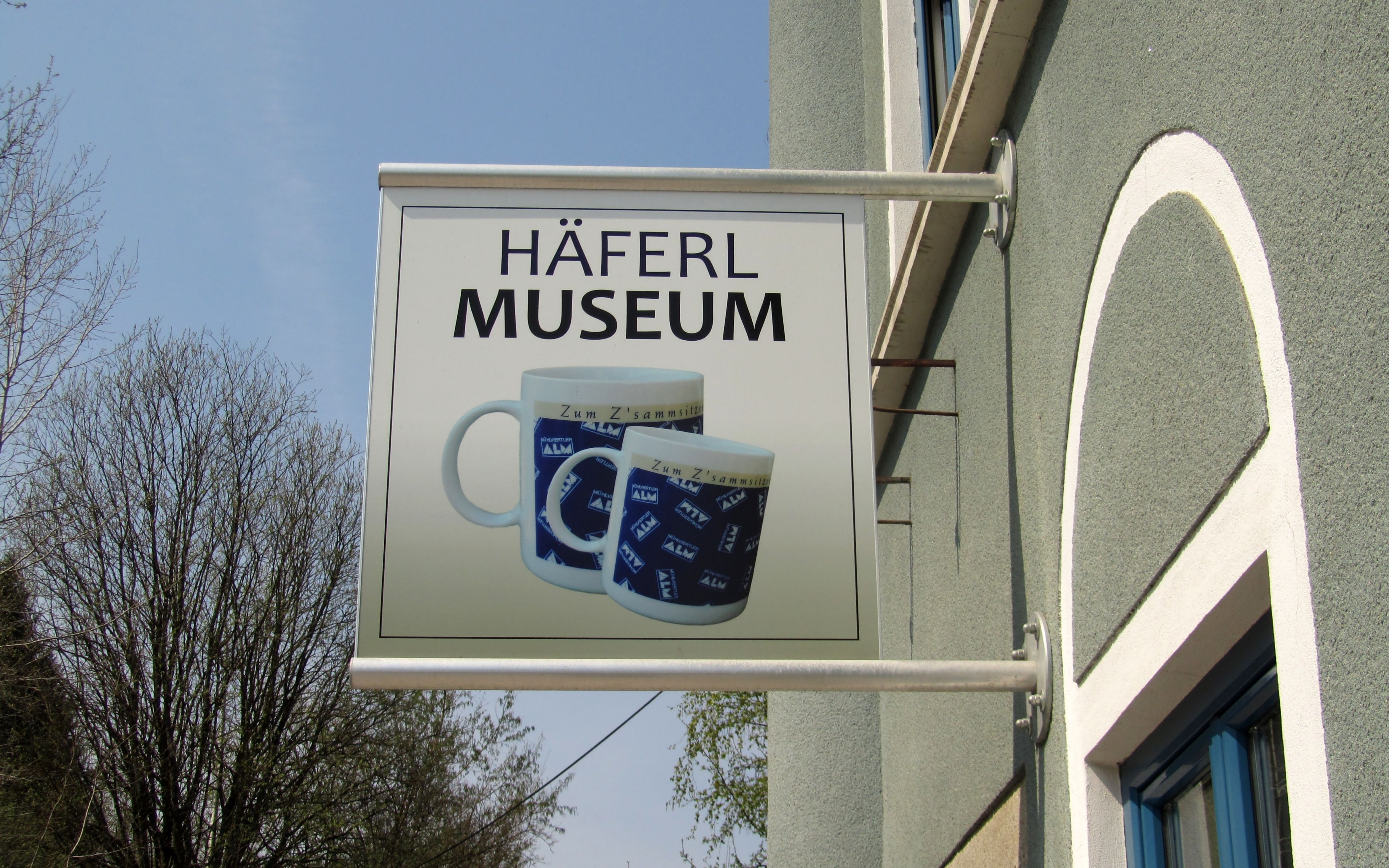 Werbeschild des Häferlmuseums in Pierbach (Bezirk Freistadt)